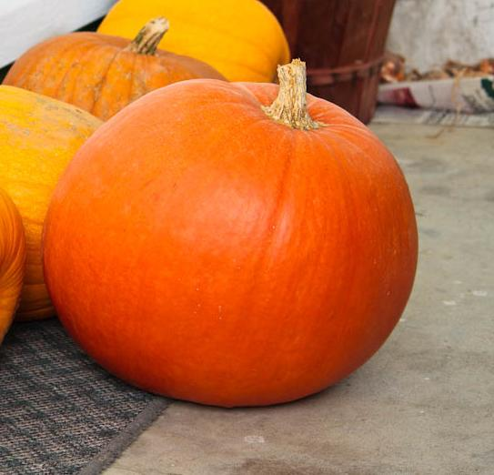 Pumpkin Harvest